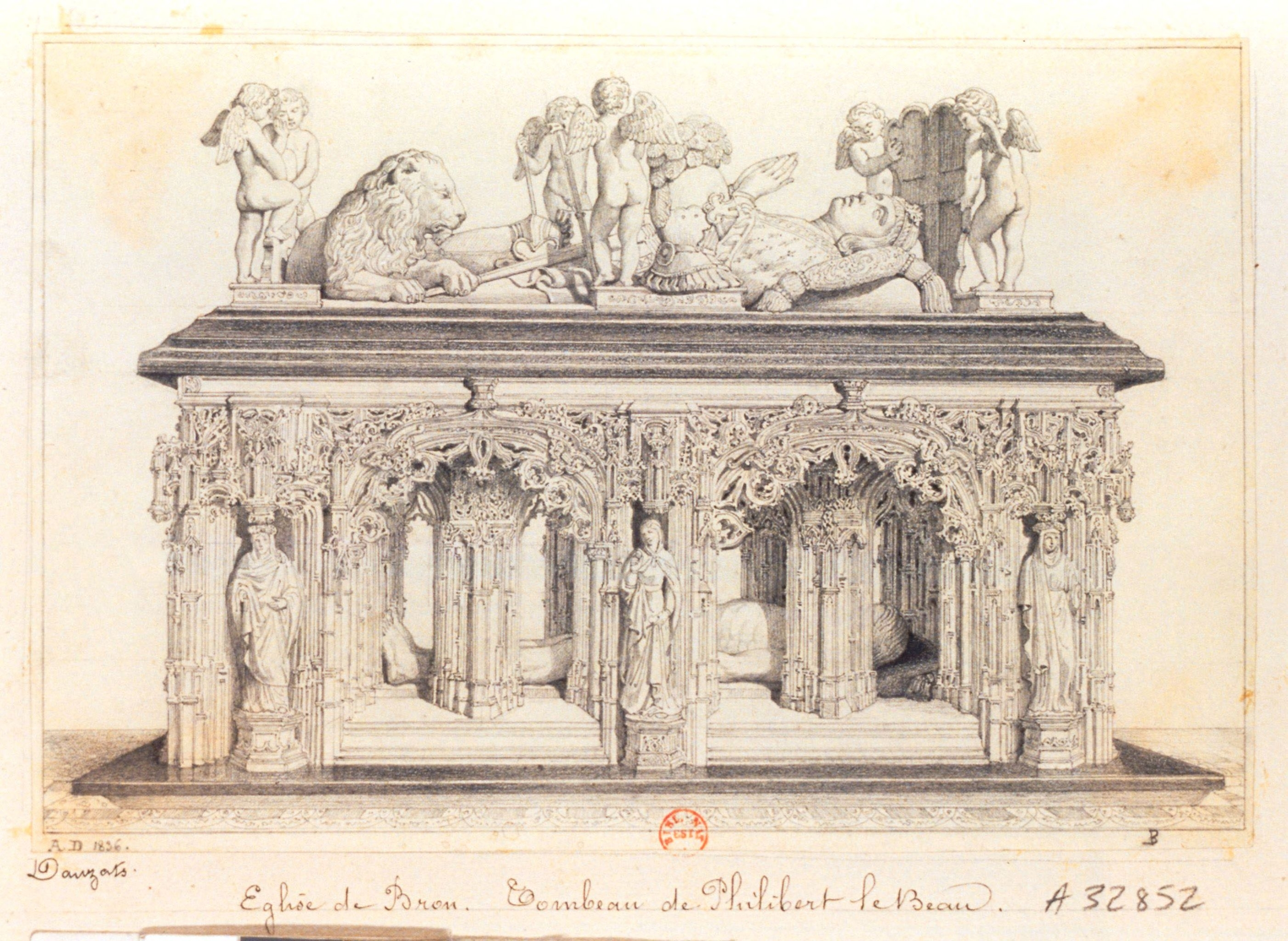 Eglise de Brou. Tombeau de Philibert le Beau : dessin